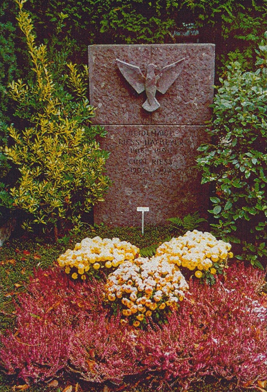 Friedhof Enzenbühl-Heidemarie Hatheyer